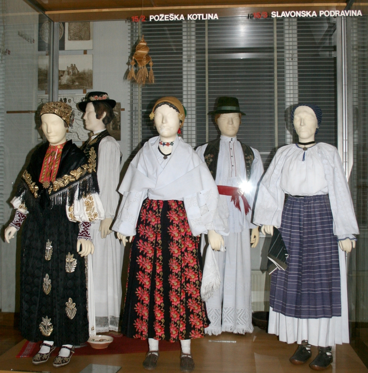 snimljeno tijekom Noći muzeja u Etnografskom muzeju u Zagrebu